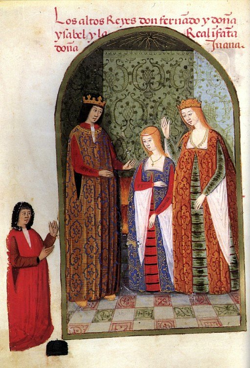 Los Reyes Católicos y la infanta doña Juana. Imágen del "Rimado de la conquista de Granada", de Pedro Marcuello